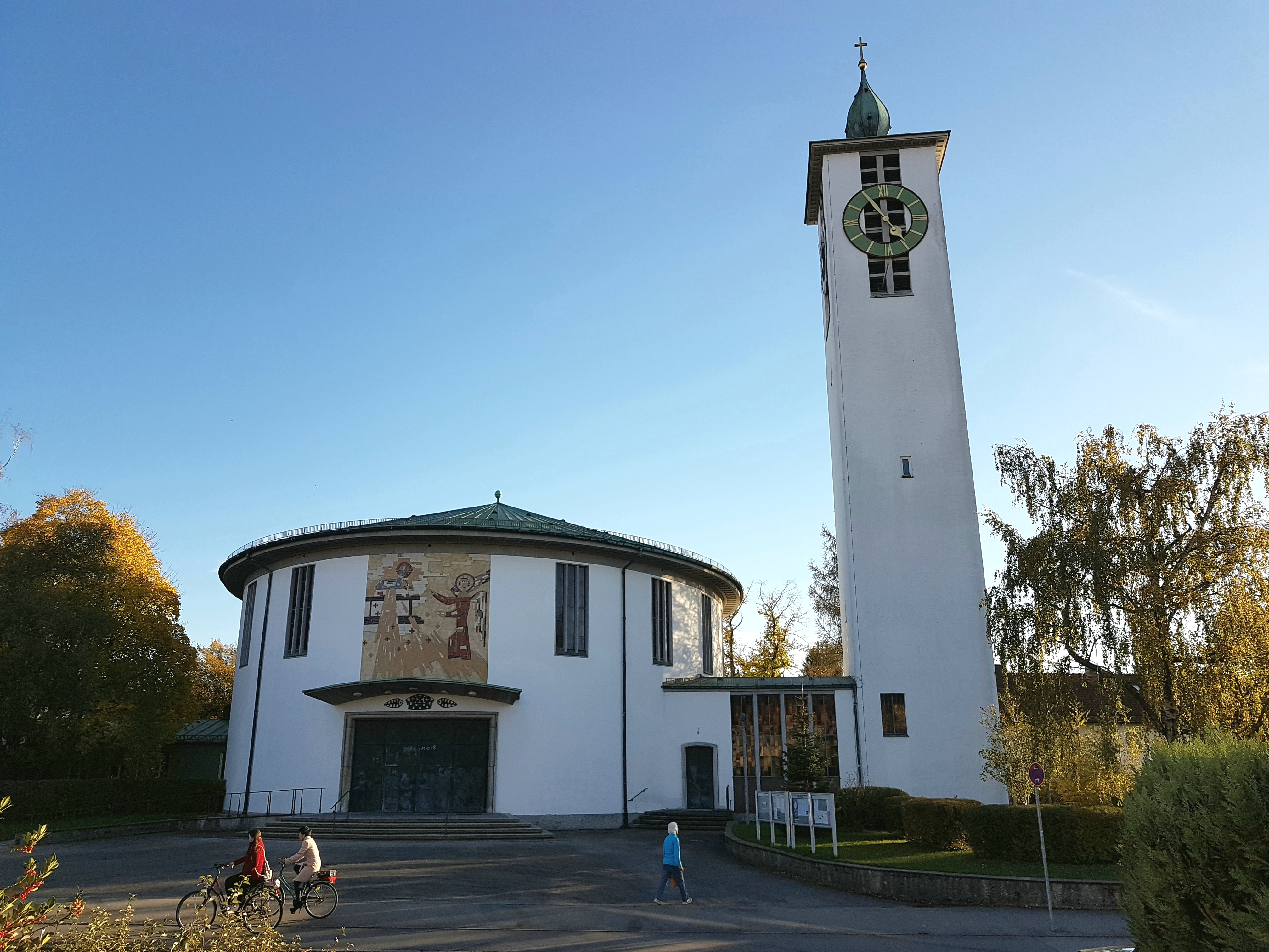 München-Kleinhadern, katholische Pfarrkirche Fronleichnam.